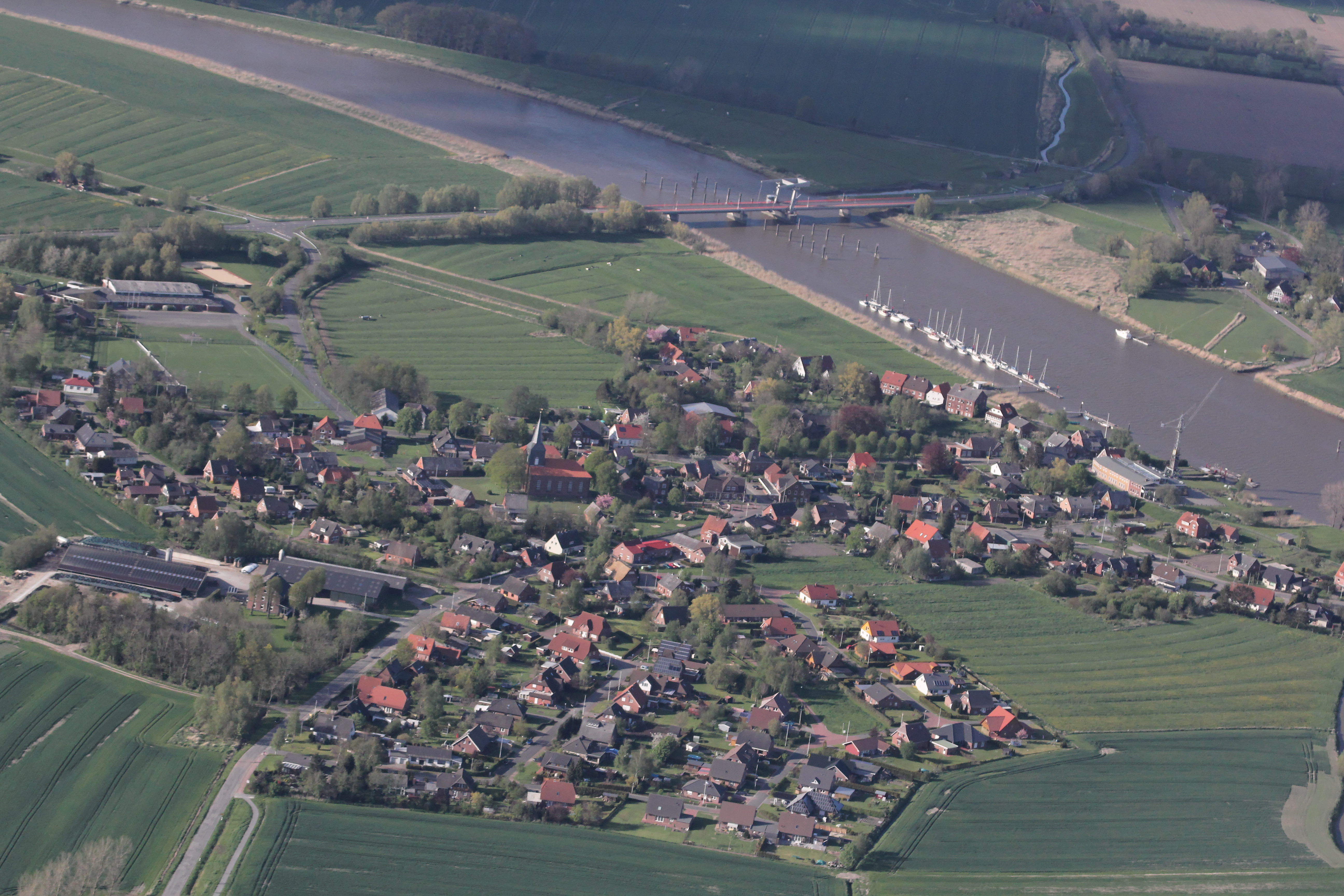 Geversdorf mit Hafen und Zugbrücke